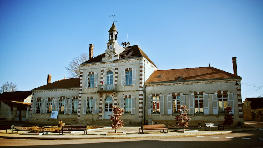 Mairie de Mont-Saint-Sulpice